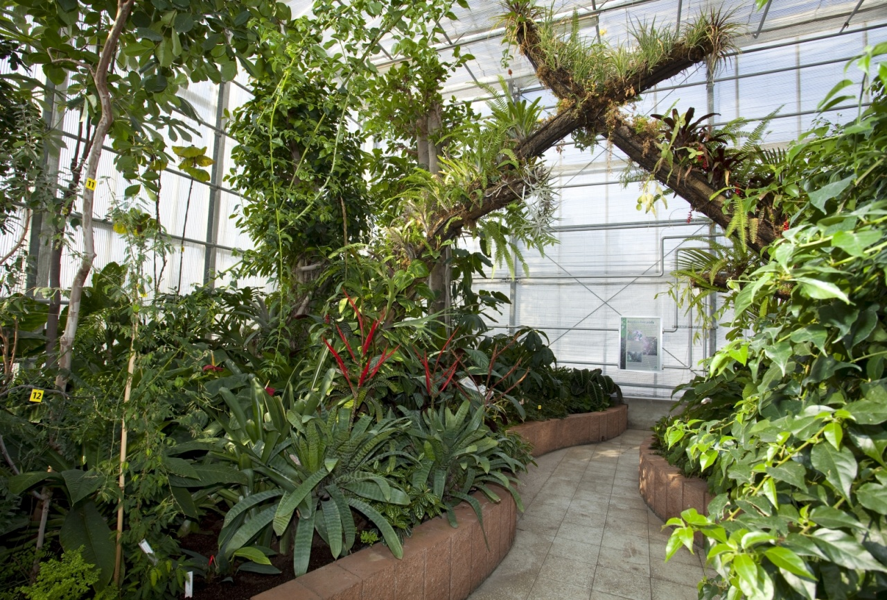 Česky: Skleníková expozice v Arboretu Nový Dvůr